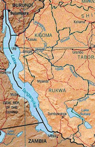 Map of the Tanganyika Lake, Tanzania